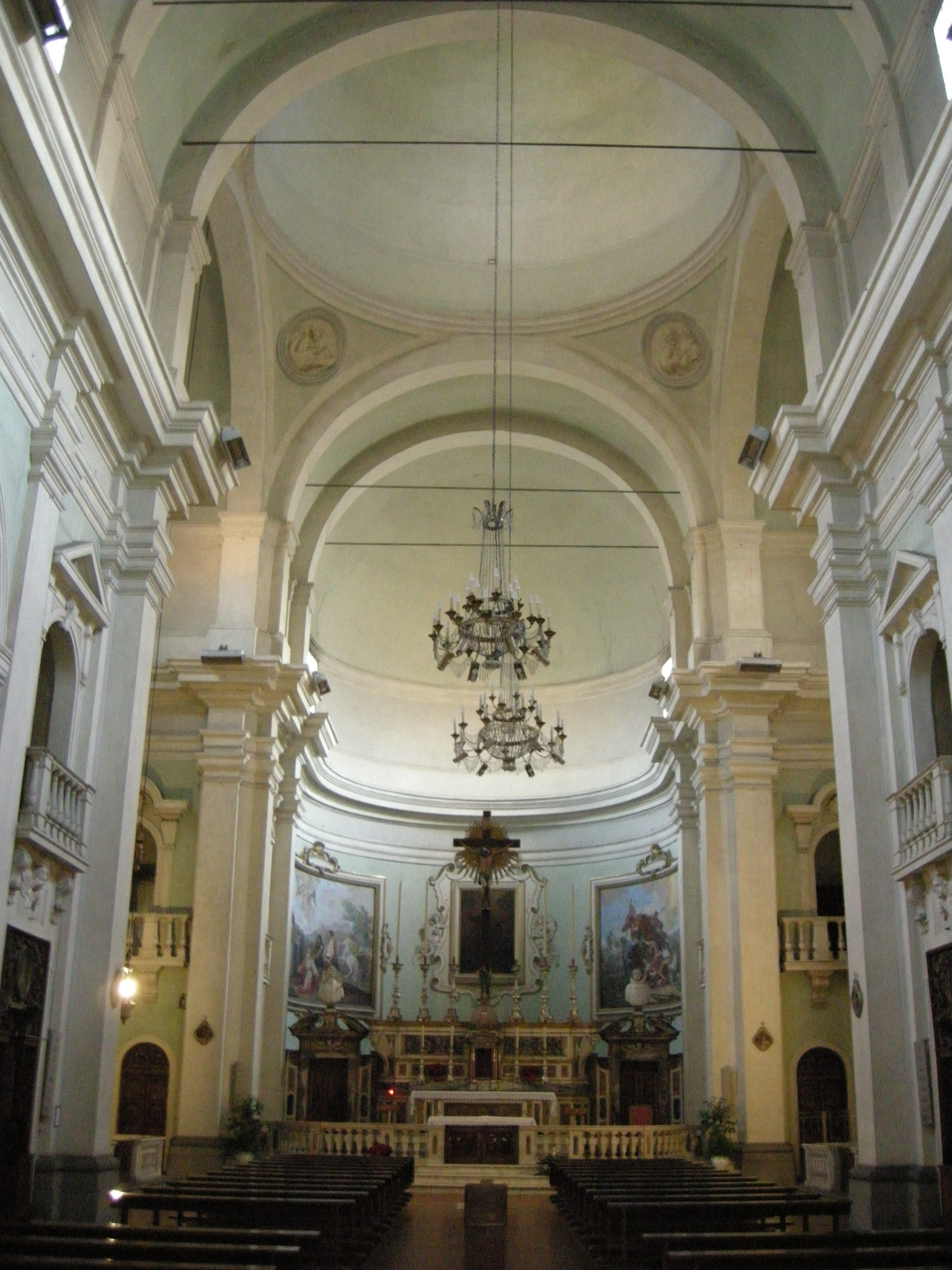 San paolino, interno